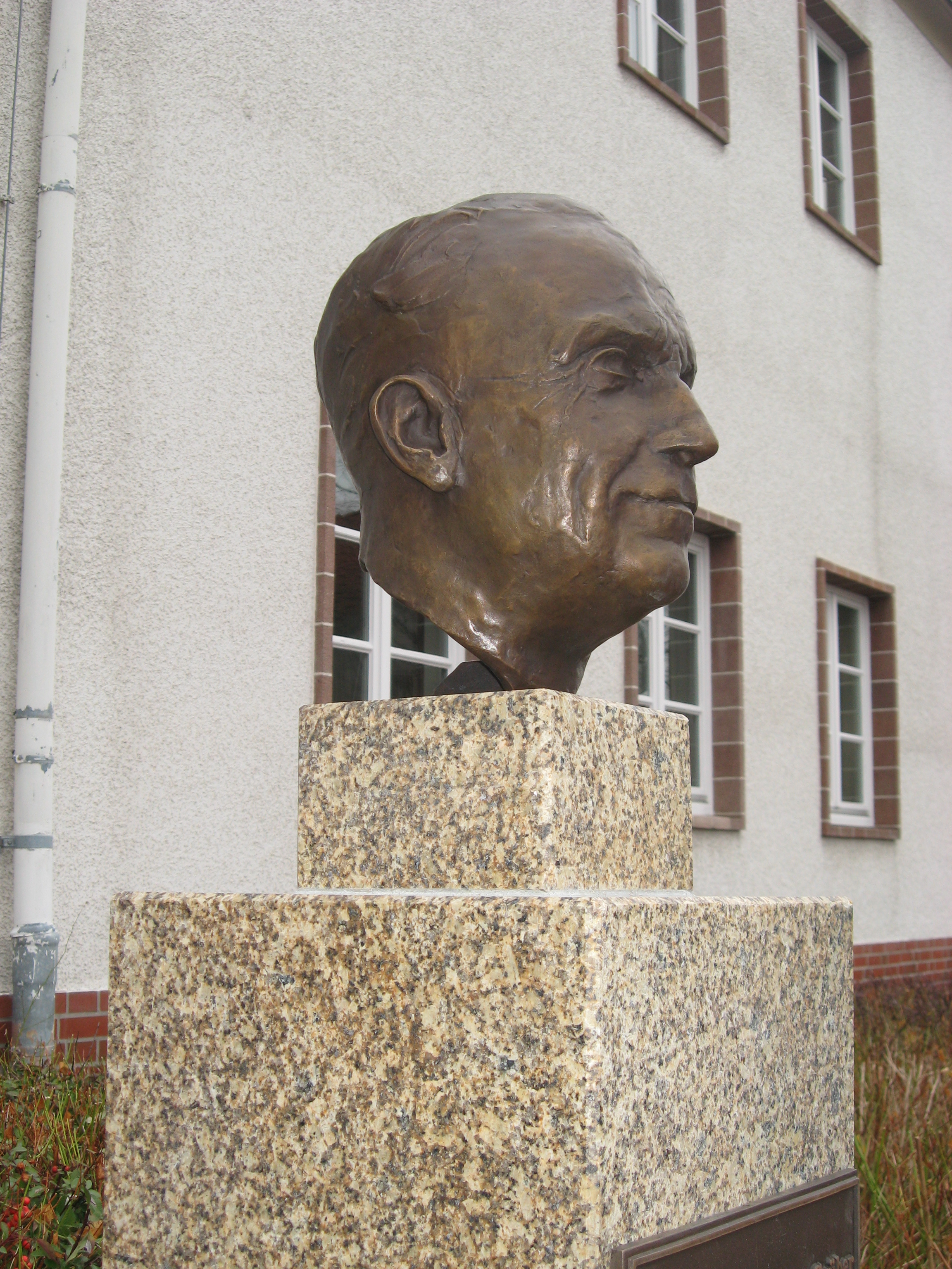 Büste Heinrich Grübers, die am 29.11.2011 am nach ihm benannten Platz in Oranienburg aufgestellt wurde